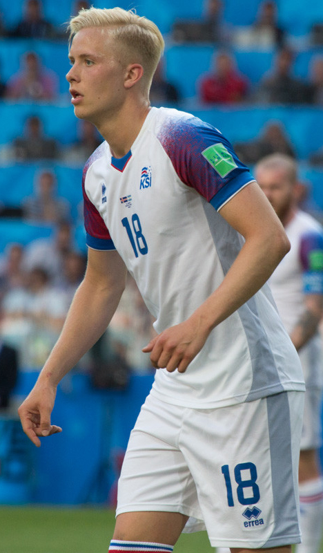 Месси и Ко не смогли обыграть неуступчивых исландцев